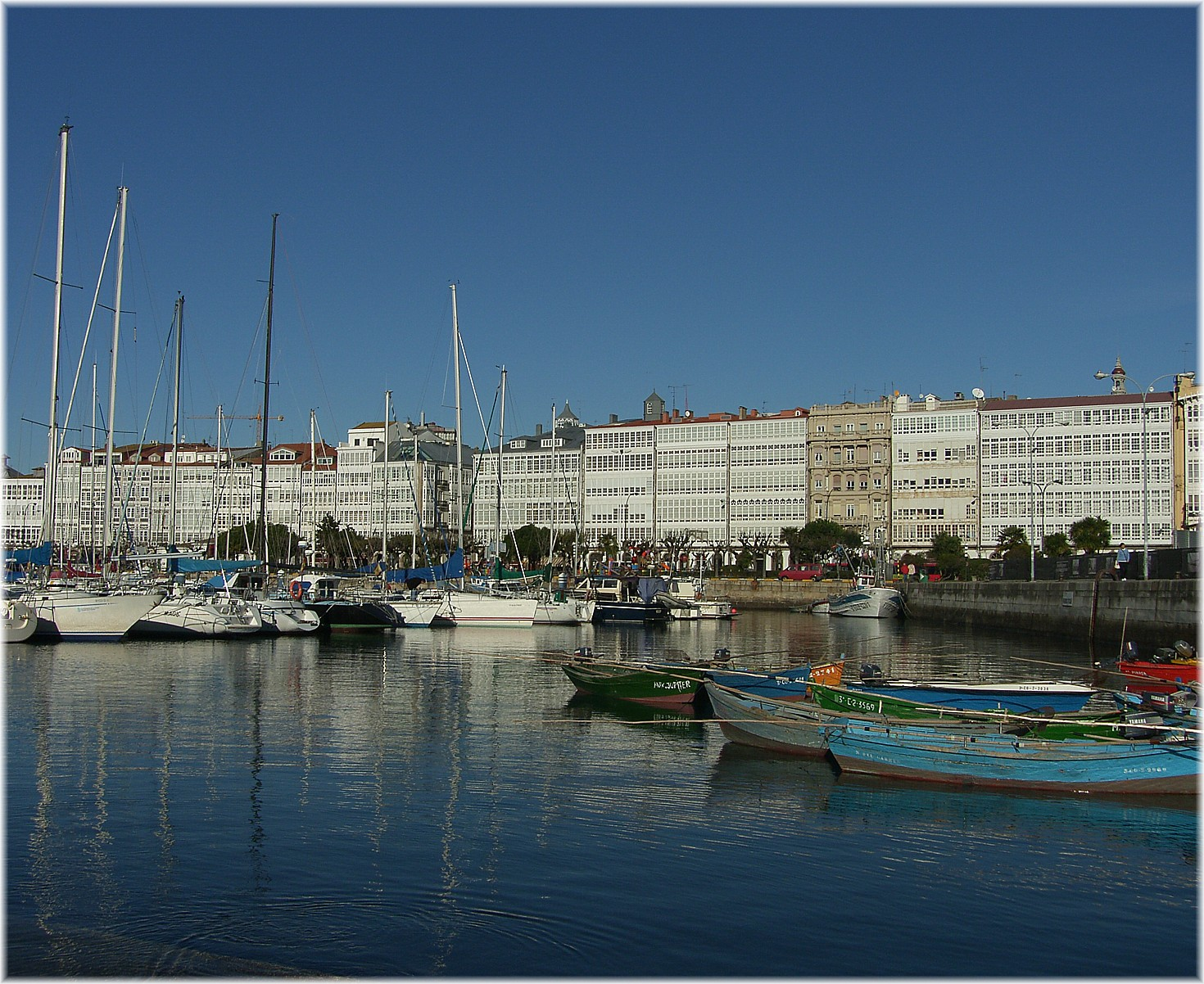 Darsena da Mariña. A Coruña